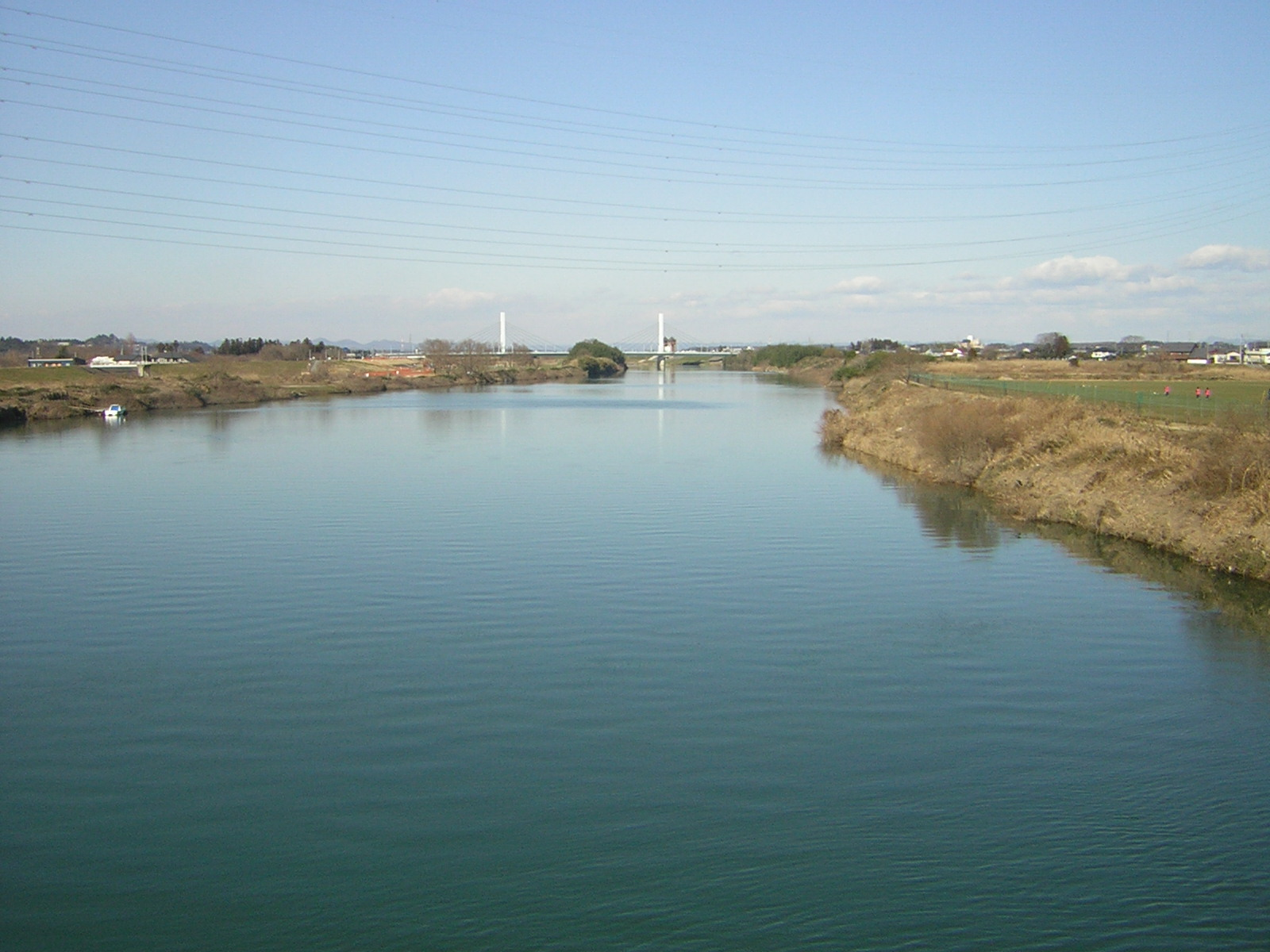 Vue de la rivière Naka depuis la ville de Mito.